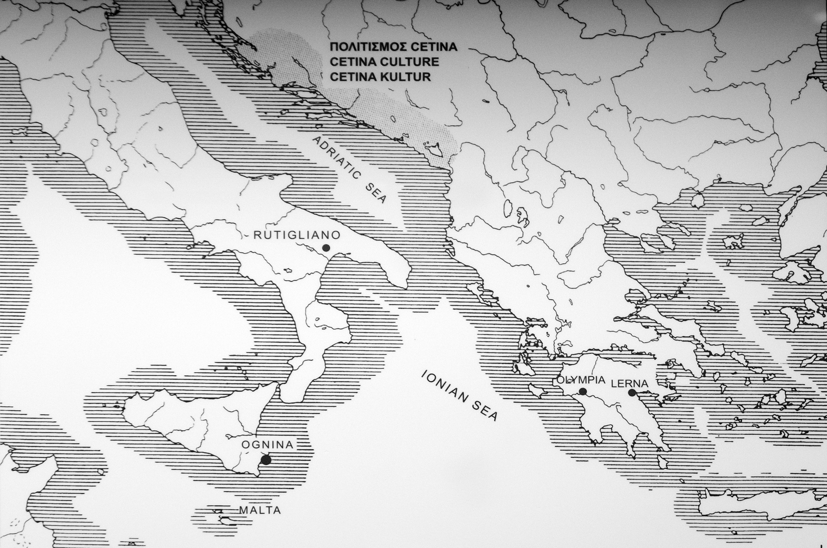 La mappa mostra i più importanti centri di diffusione della cultura di Cetina. (Museo Archeologico di Olimpia)